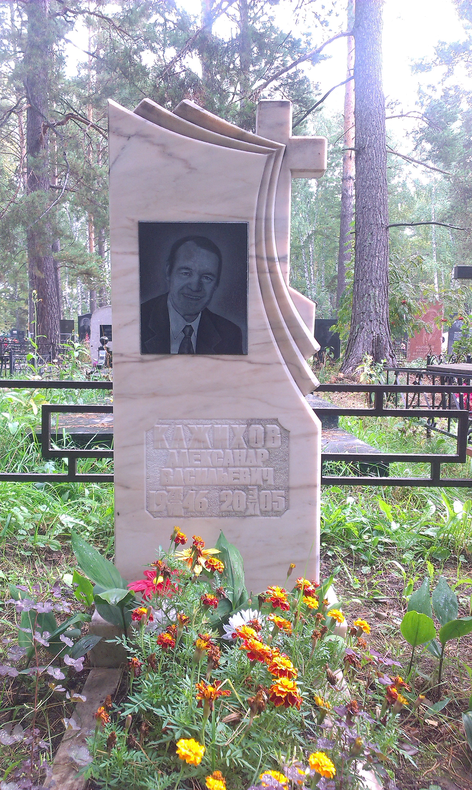 Южное (Чербузинское) кладбище